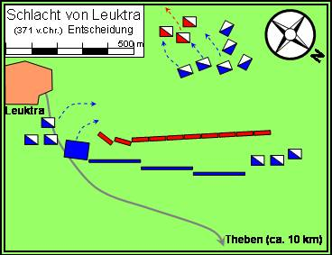 Schlacht bei Leuktra Entscheidungsphase